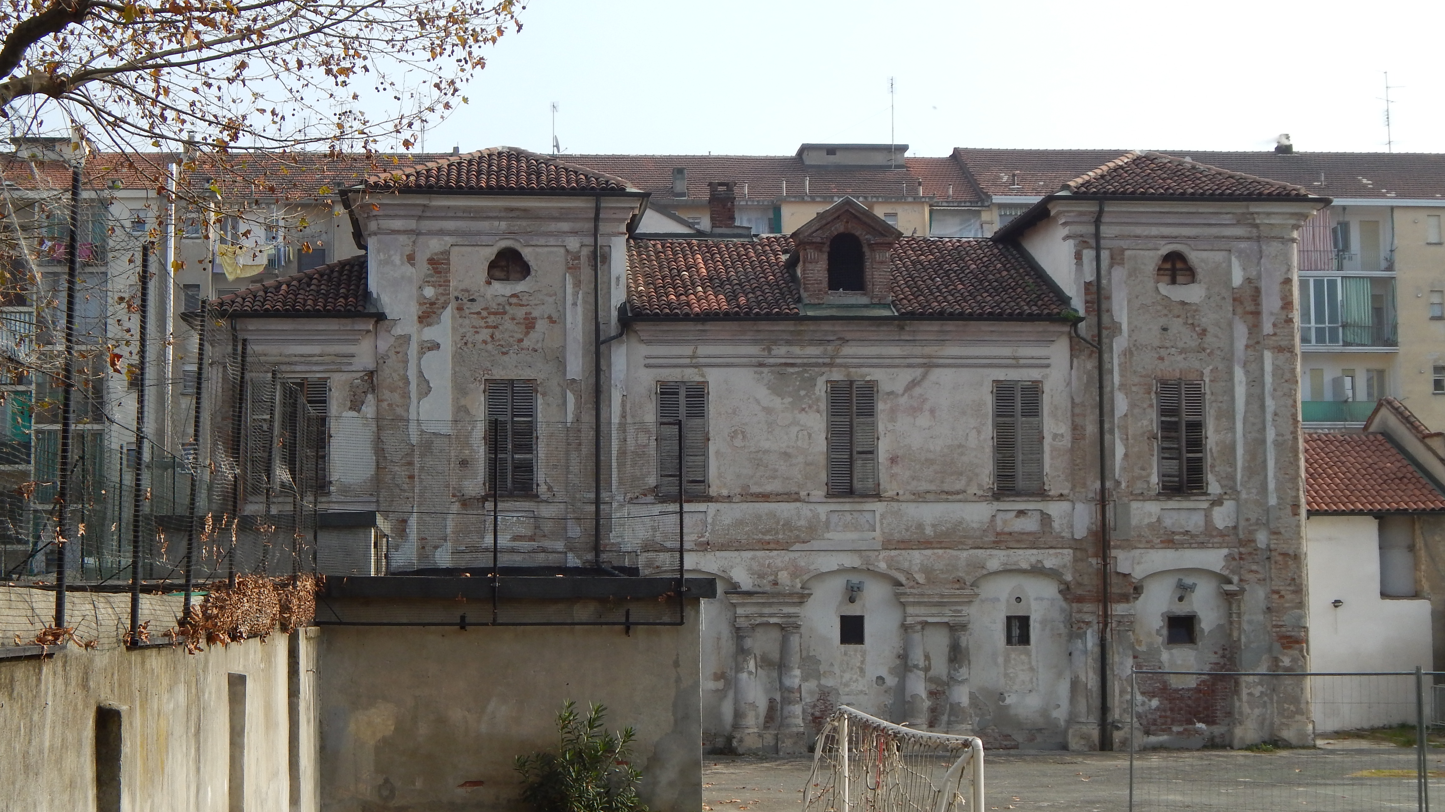 Una veduta di Borgata Lesna